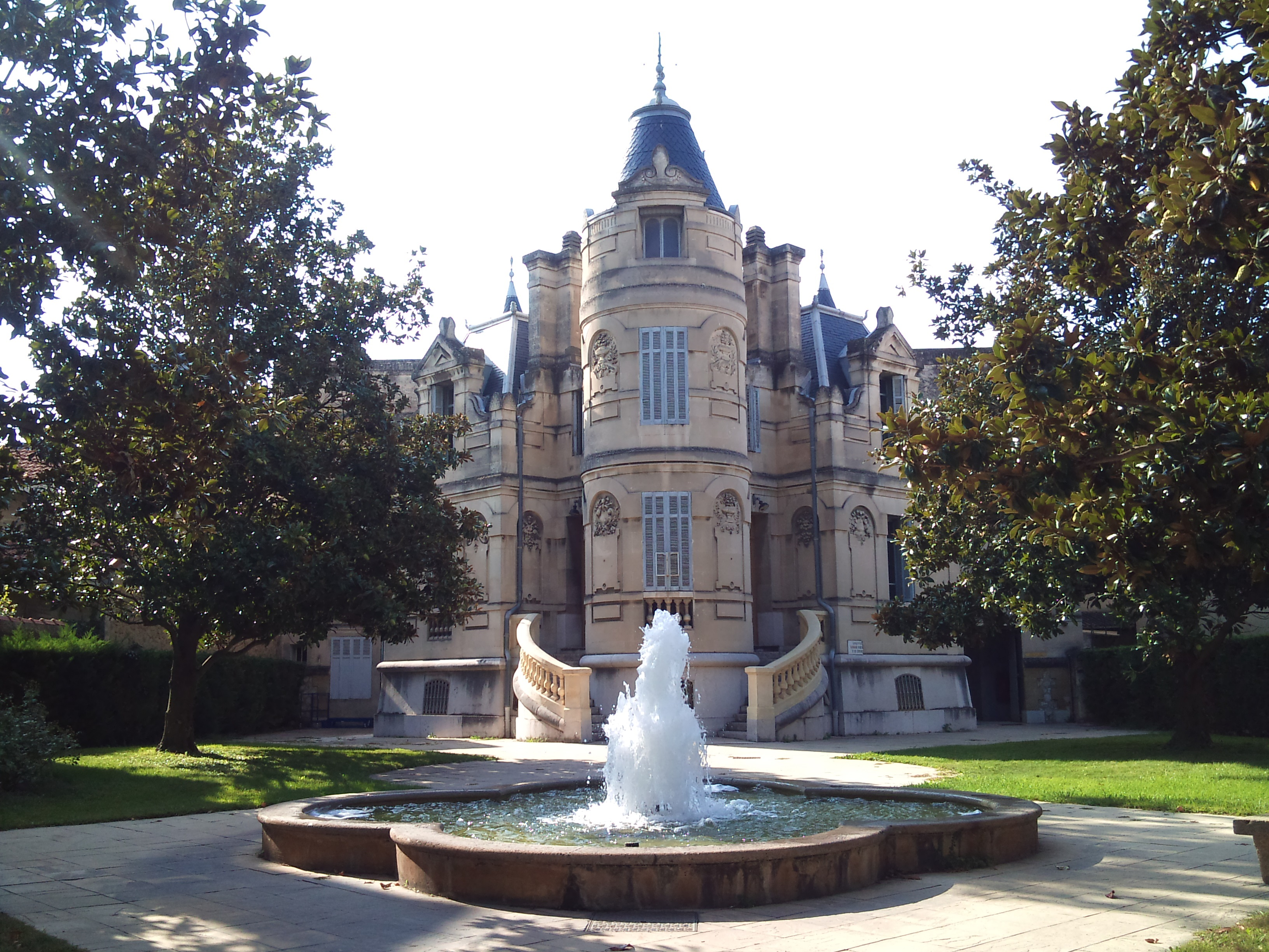 Photo prise en 2012